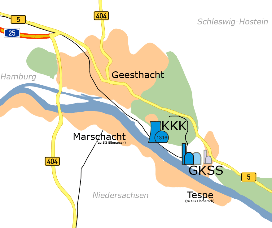 Skizze einer Karte, Gebiet des Leukämie-Clusters Elbmarsch Legende: KKK = Kernkraftwerk Krümmel GKSS = GKSS Forschungszentrum SG Elbmarsch = Samtgemeinde Elbmarsch grün = Wald orange = Ortschaft